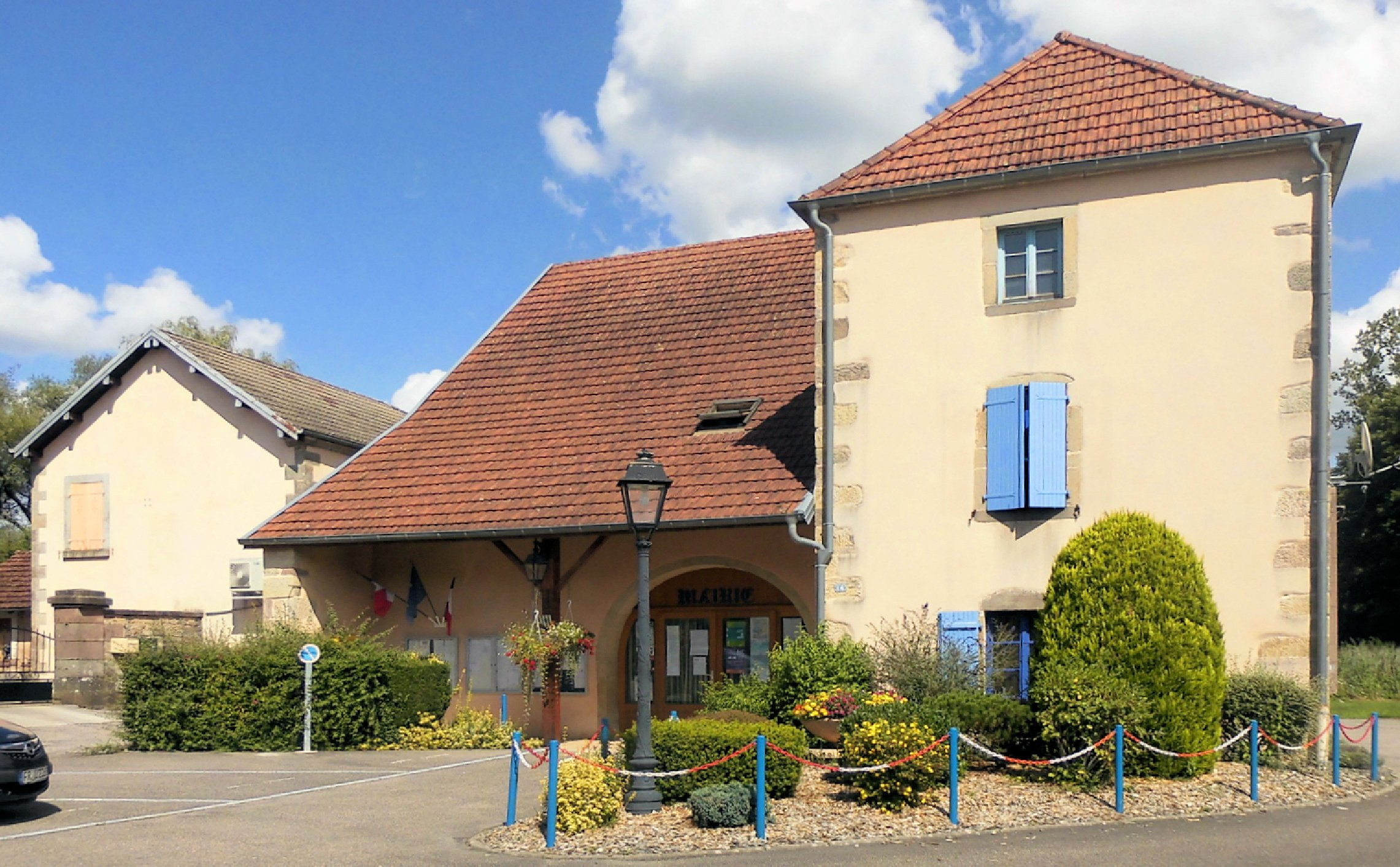 La mairie de Cuve